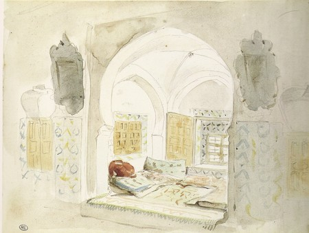 Alcove Maureque, croquis